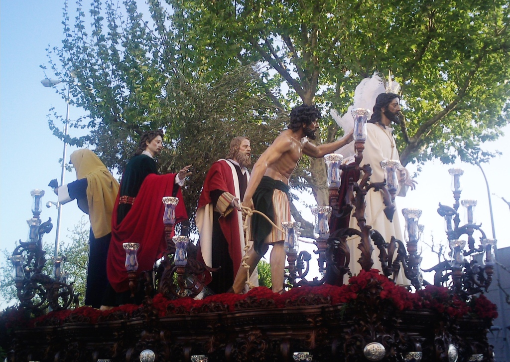 Jesus Cautivo, Hermandad del Prendimiento.